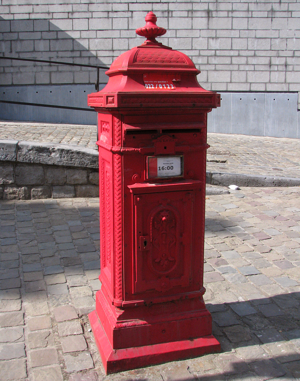 Boîte aux lettres à Mons en Belgique - Foto Wolfgang Pehlemann IMG_1684